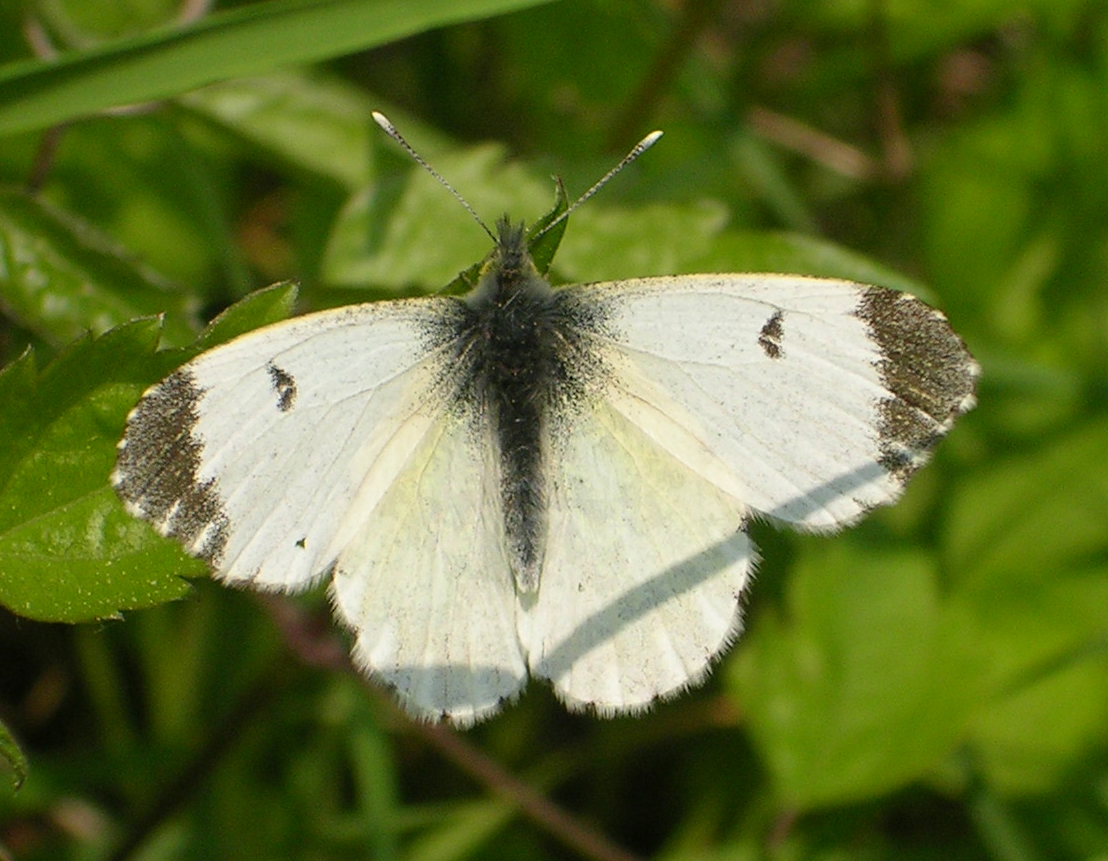 Aurorafalter (Anthocharis cardamines)Hackenberg, Wien